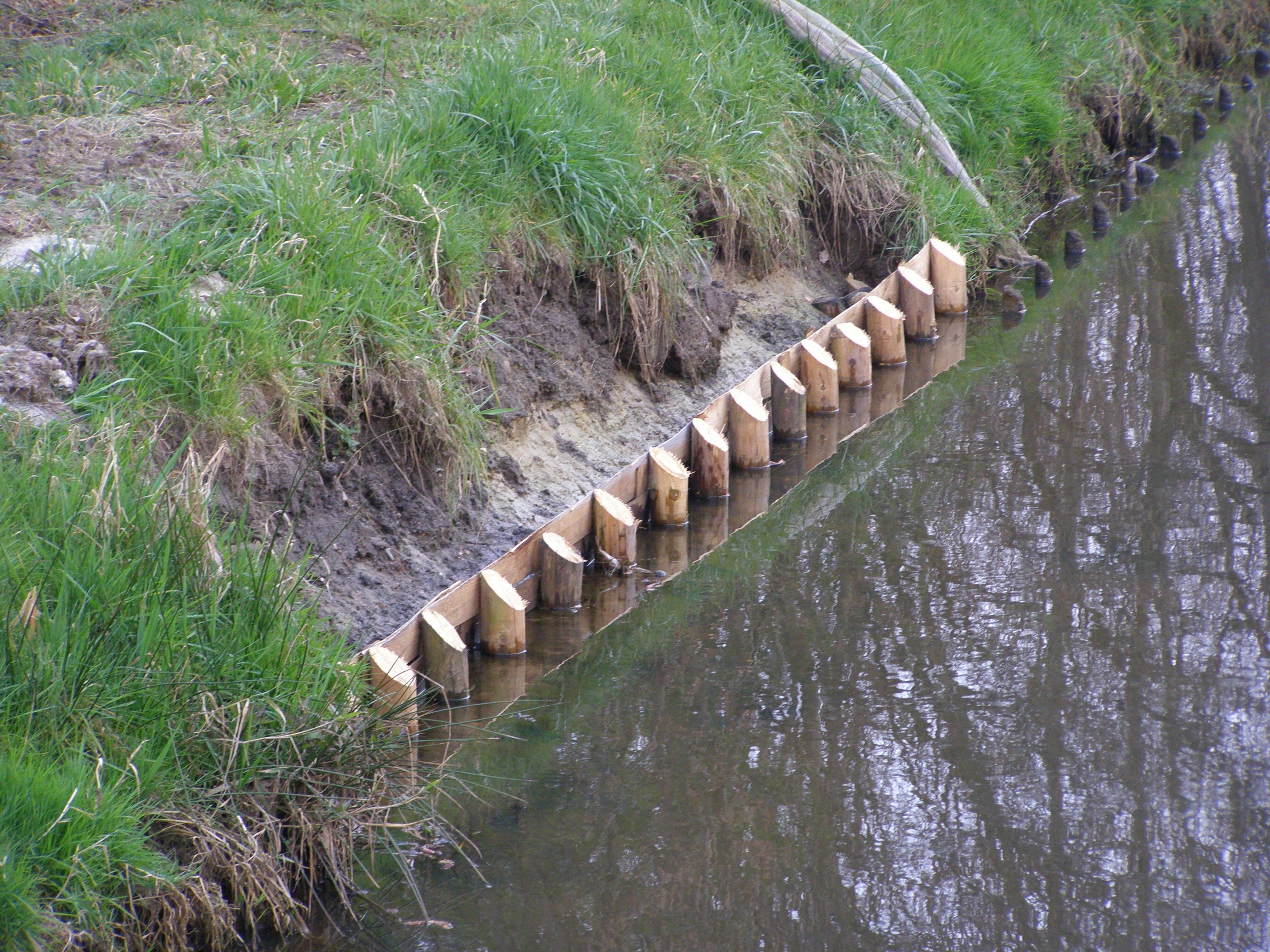 eigen werk. De Bolscherbeek is een beek in de Nederlandse provincie Overijssel. De beek ontspringt ten oosten van Haaksbergen en stroomt in noordwestelijke richting langs Hengevelde om ten zuiden van Goor in het Twentekanaal uit te monden